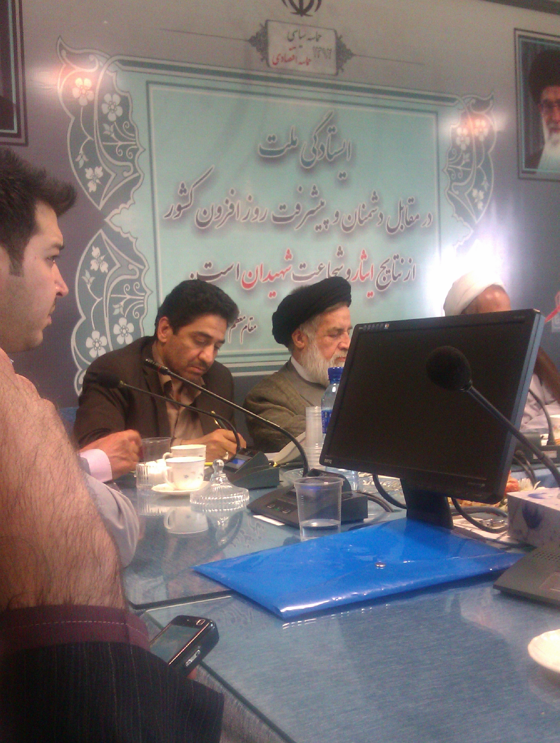 دکتر حمید اسدی دبیر کل جبهه یادگاران شاهد در دیدار با حجت الاسلام شهیدی ریس بنیاد شهید کشور 27 شهریور 1392